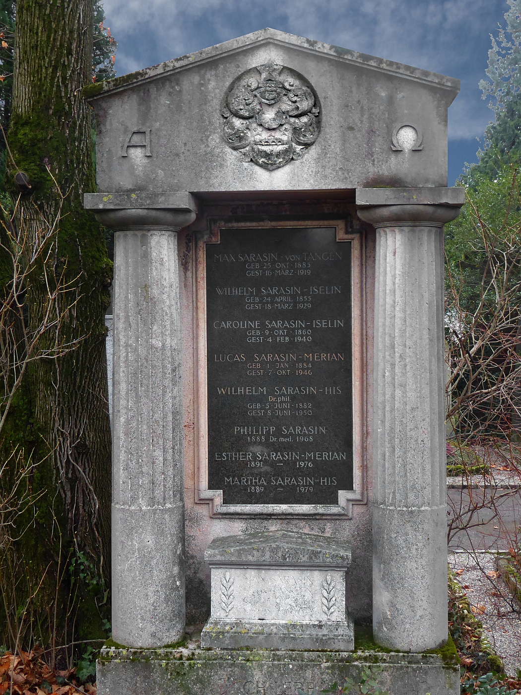 Philipp Sarasin (1888–1968) Dr.med., Psychiater, Psychoanalytiker, Gründungsmitglied und Präsident der Schweizerischen Gesellschaft für Psychoanalyse. Grab auf dem Friedhof Wolfgottesacker, Basel